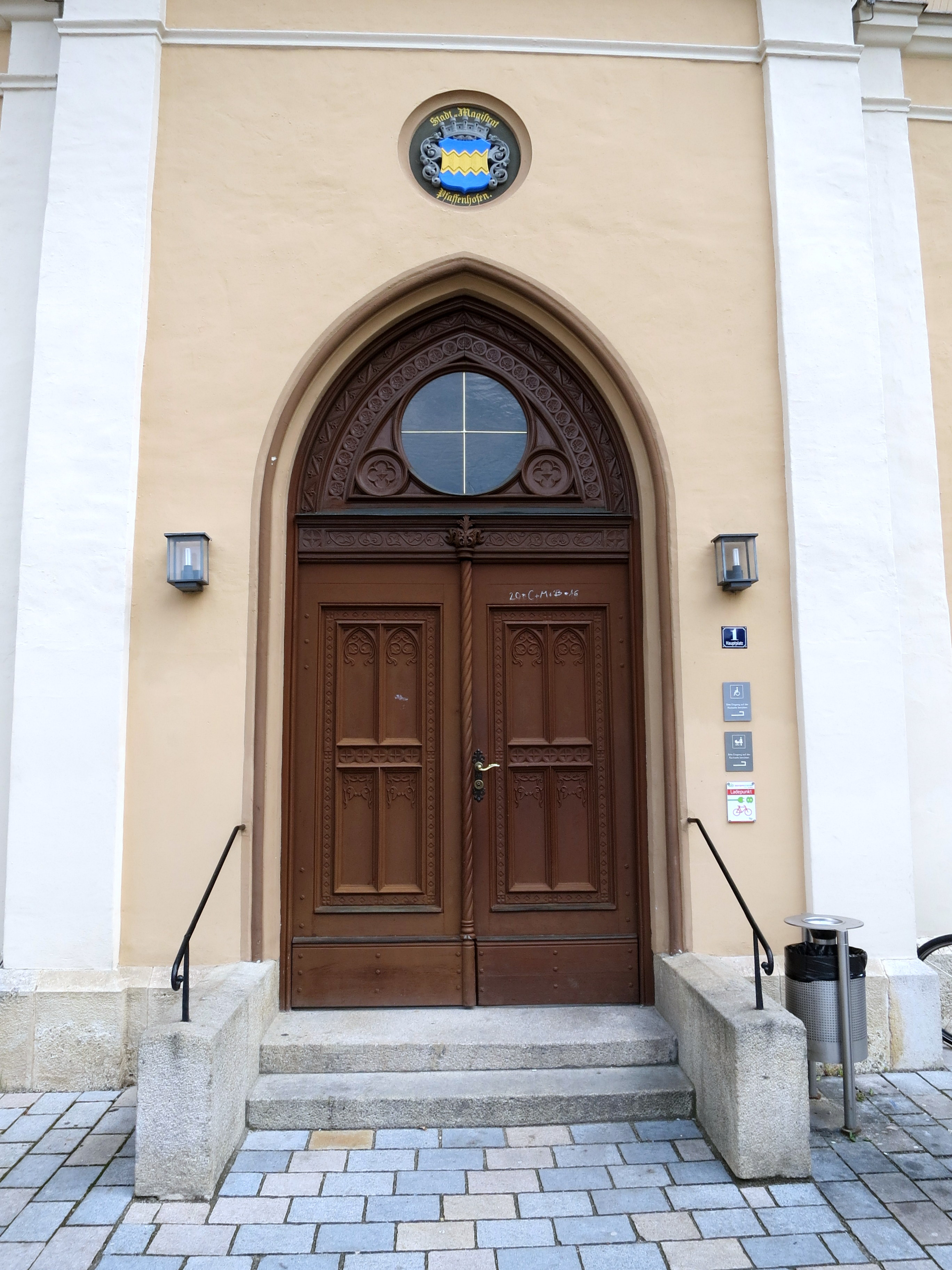 Ein typisch neoromanischer Eingang